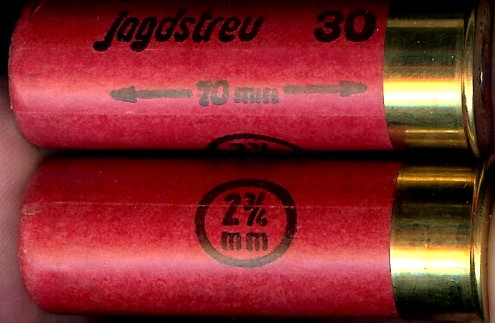 Angaben auf der Hülse einer Schrotpatrone (Hülsenlänge=70mm, Ladungsart(=Streu), Ladungsgewicht=30g, Schrotdurchmesser =2¾mm)